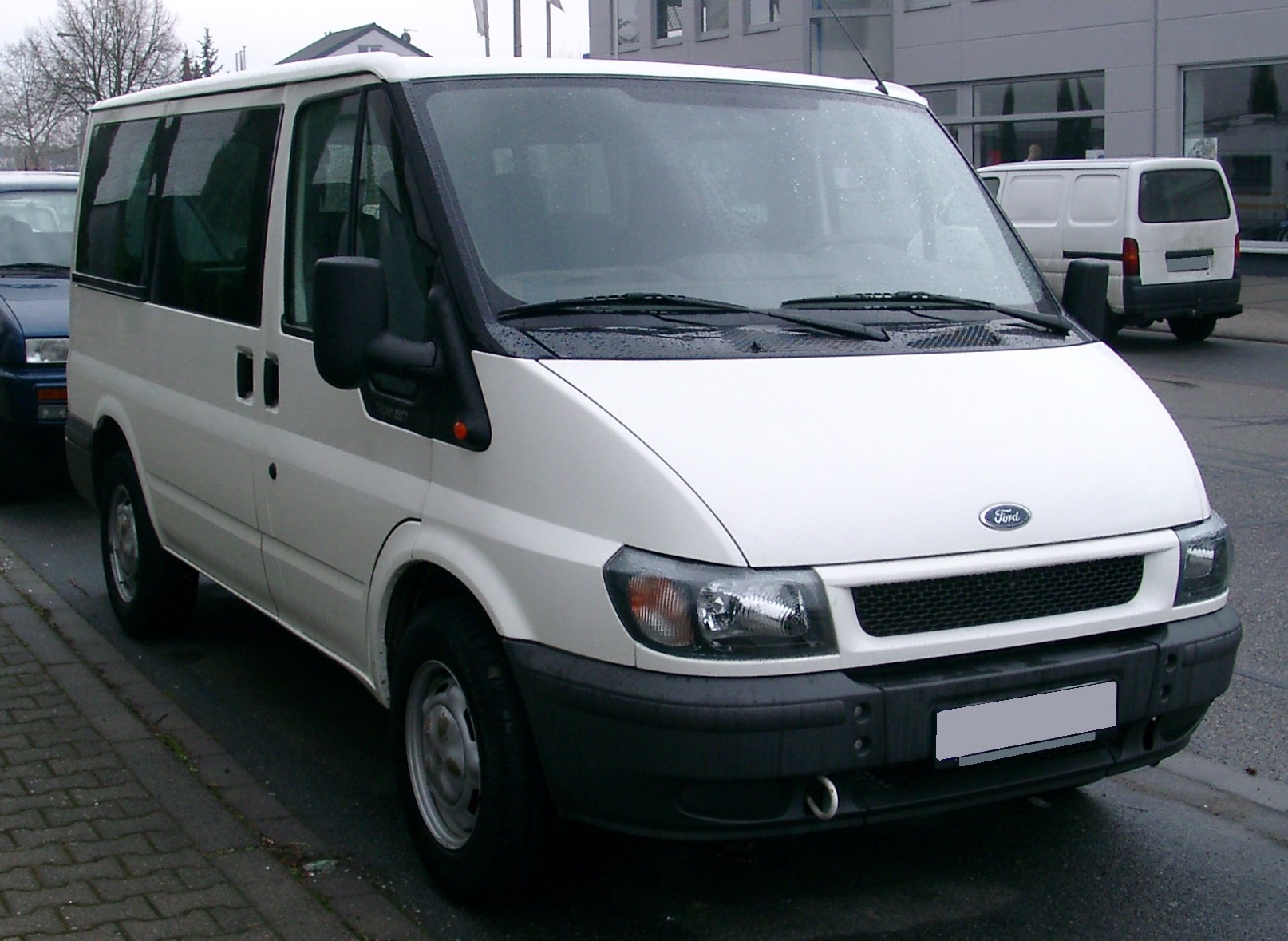 Ford Transit, 5. Generation L1H1